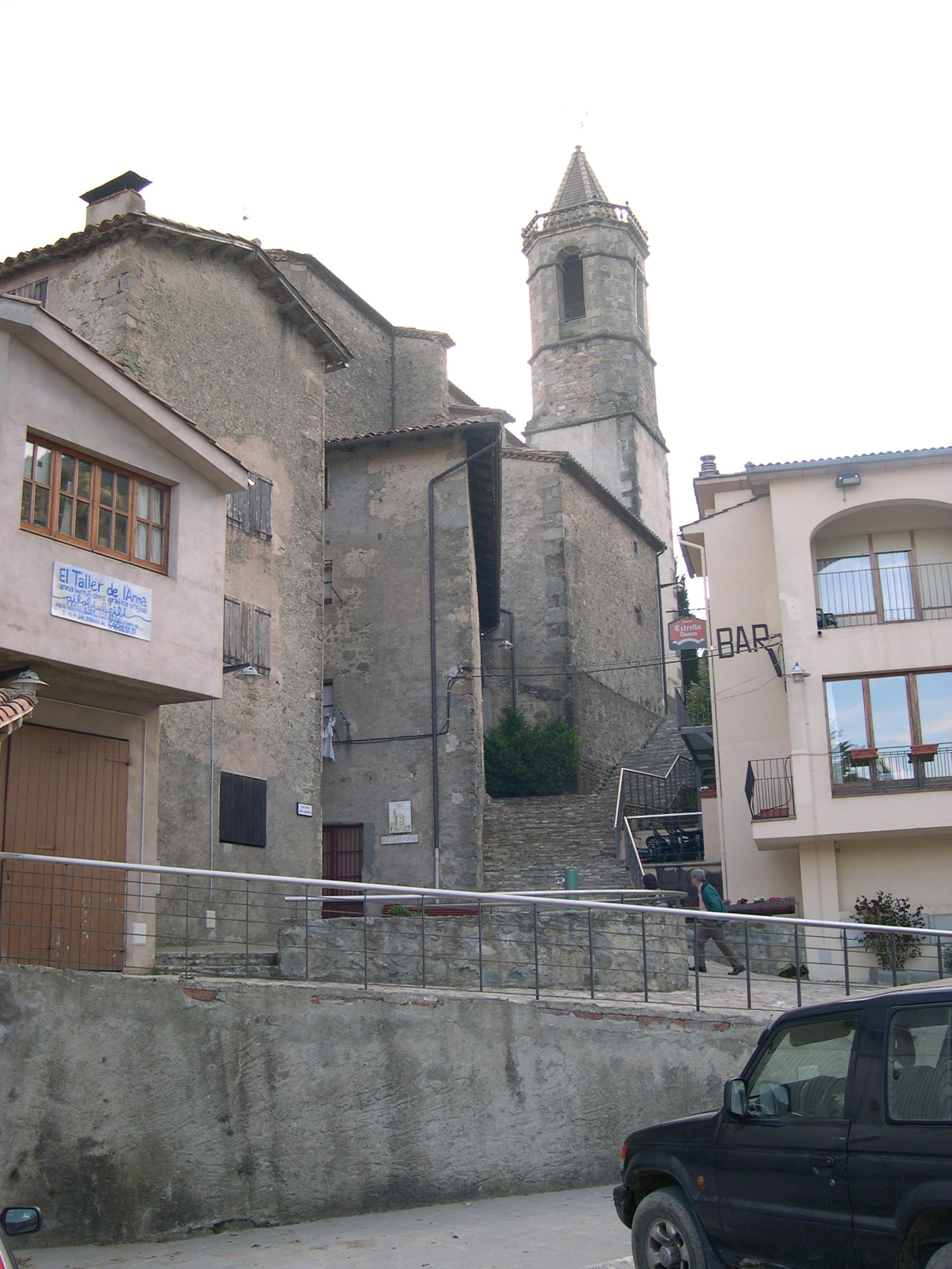 Església de Sant Hilari de Vidrà. (Vidrà). Object location42° 07′ 20.86″ N, 2° 18′ 33.86″ E